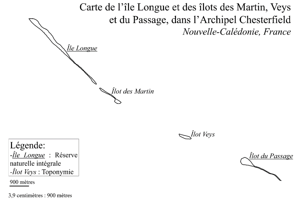 Carte de l'île Longue et des îlot des Martin, Veys et du Passage, dans l'archipel des Chesterfield, Nouvelle-Calédonie, France. Présente aussi les réserves naturelles intégrales.